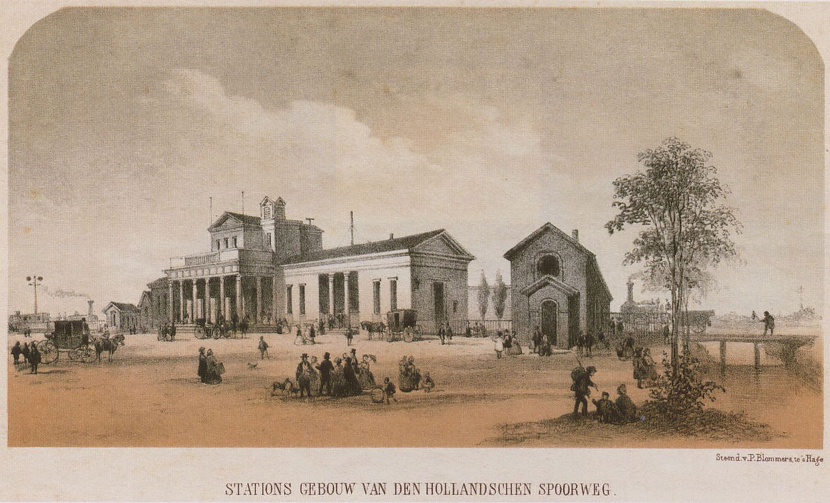 Station Hollands Spoor te ’s Gravenhage, 1843